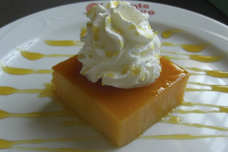 Tocino de cielo casero